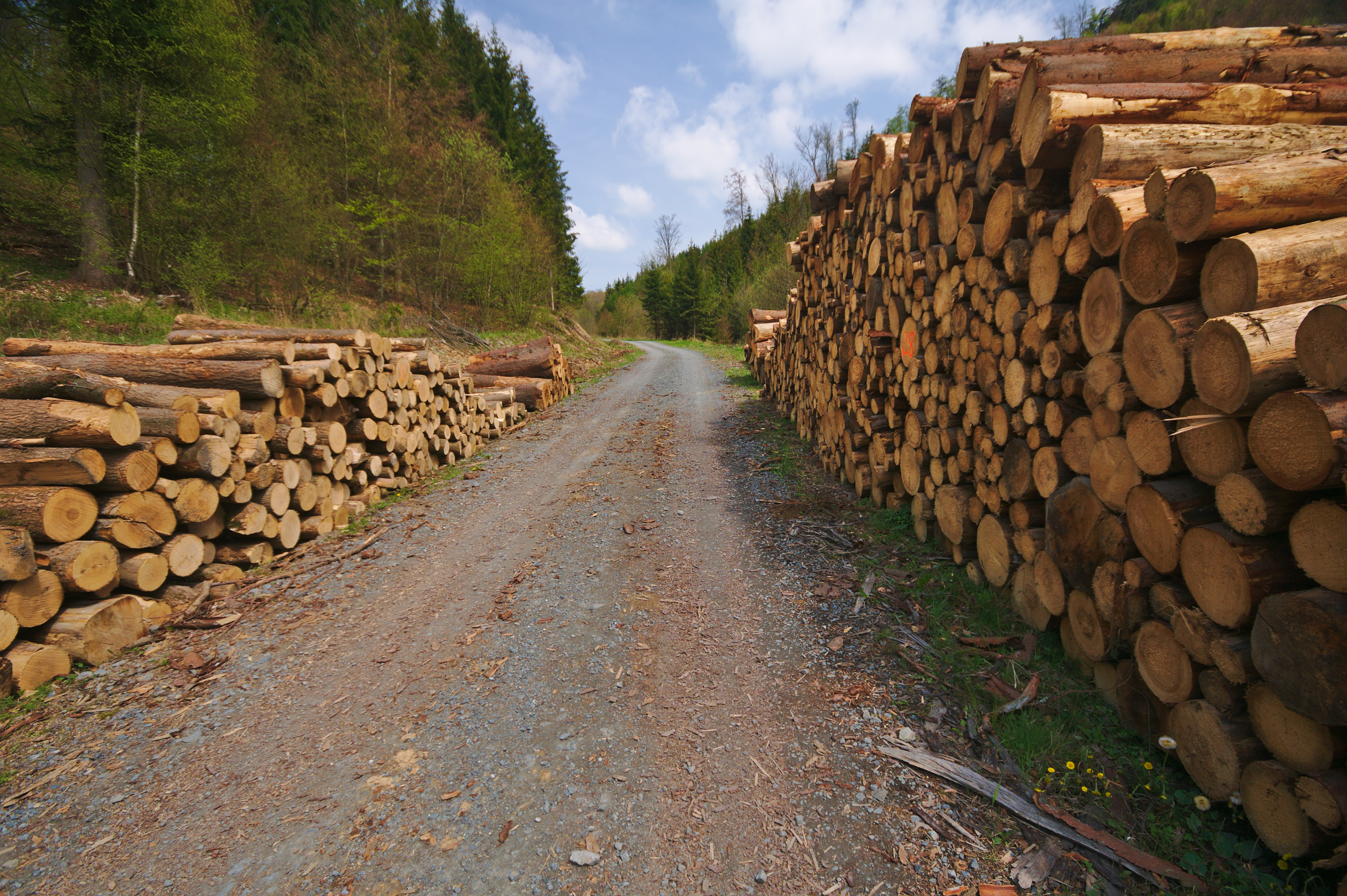 Vojenský újezd Libavá, okres Olomouc